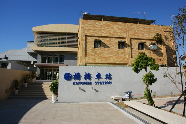 中文（台灣）: 因舊楊梅車站站房已不敷使用，目前已改建為跨站式站房。